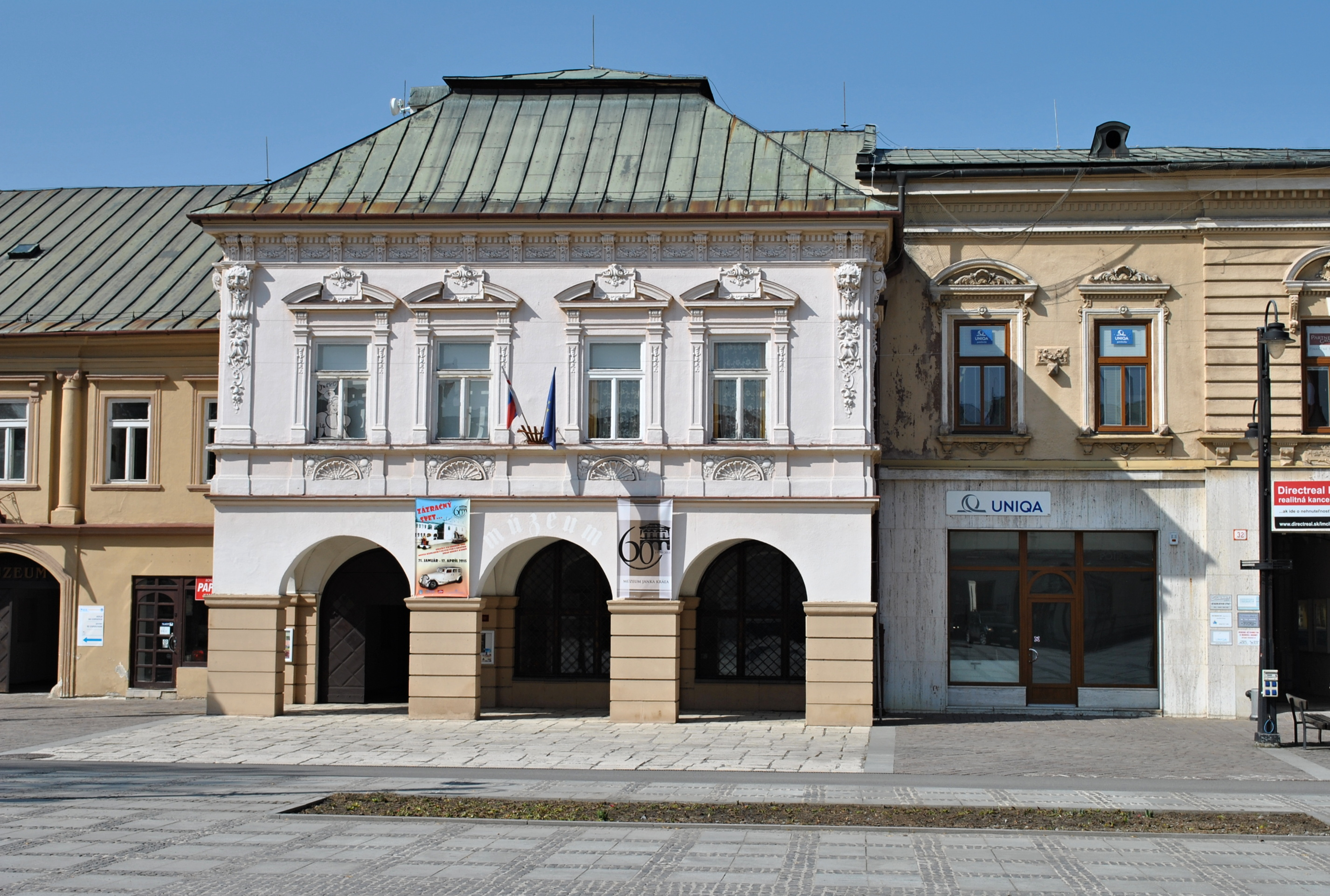 Dom župný